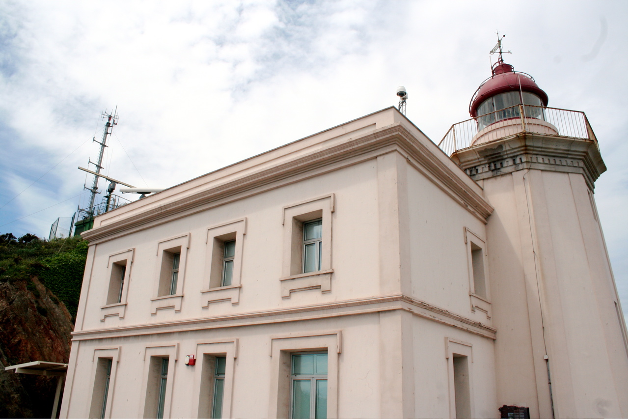 Faro de la Campa Torres